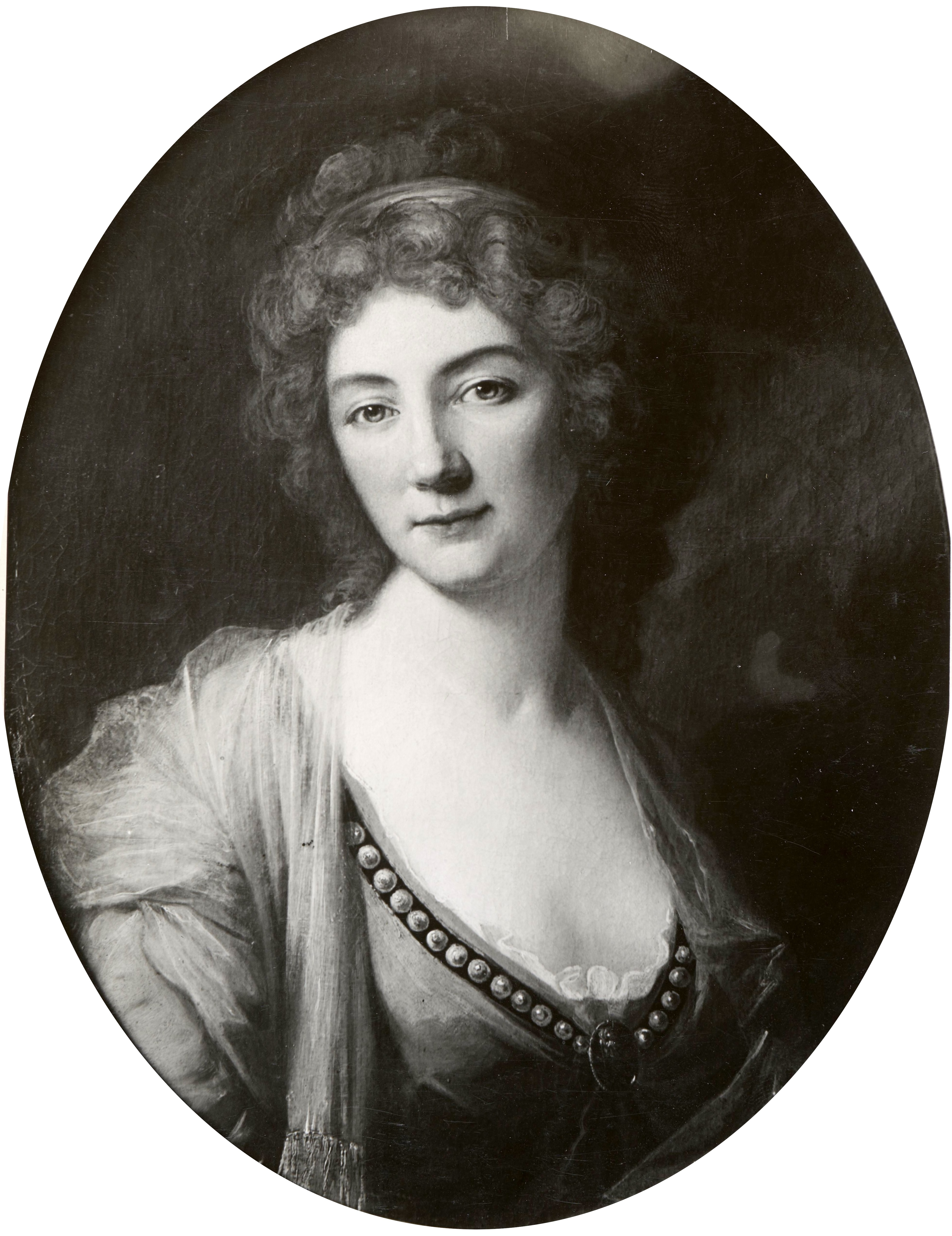 Maria z Czartoryskich Wirtemberska